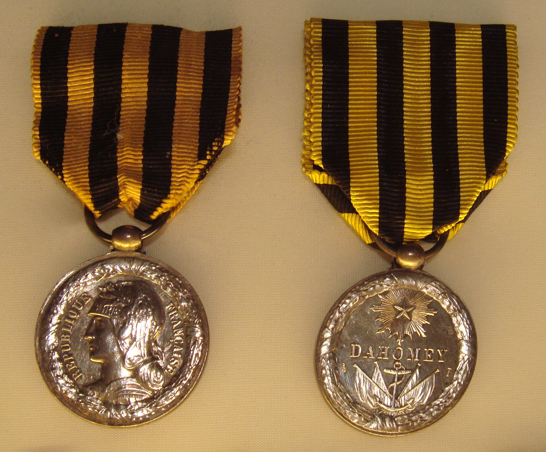 Medaille_du_Dahomey_Loi_du_12_Novembre_1892